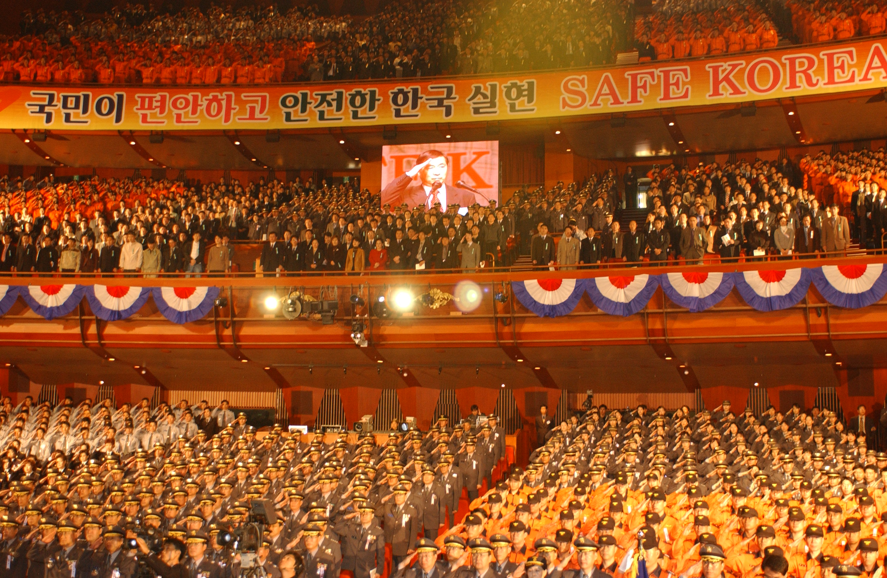 2004년 제42주년 소방의날